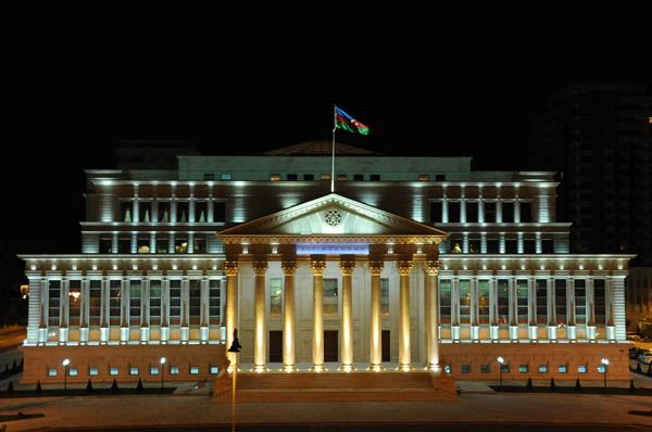 Azərbaycan Respublikası Ali Məhkəməsi